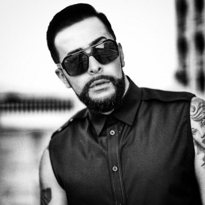 Ghetto Geasy Personal Picture